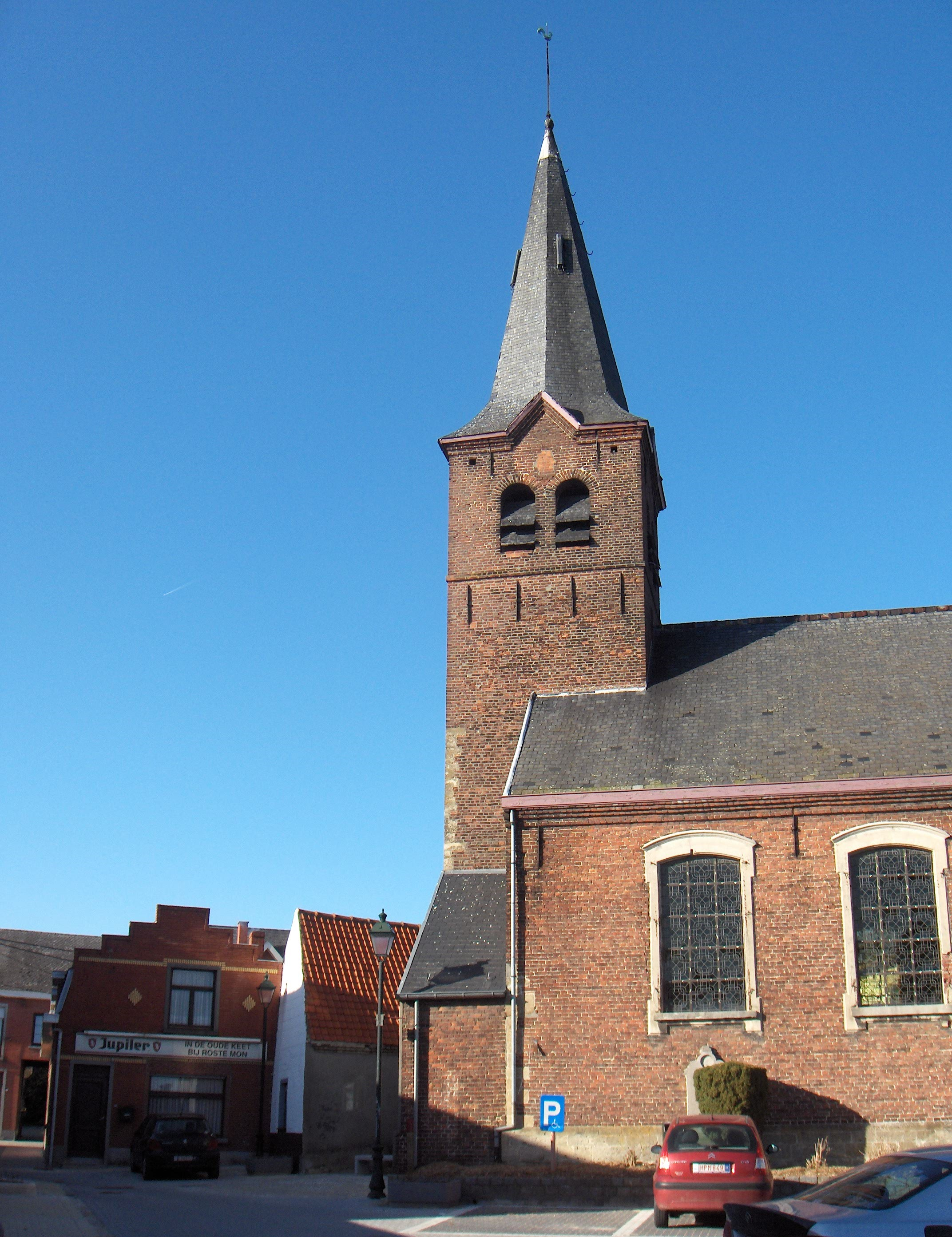 Smetlede, Ortsteil der Gemeinde Lede (Prov. Ostflandern, Belgien): Pharaildikirche.